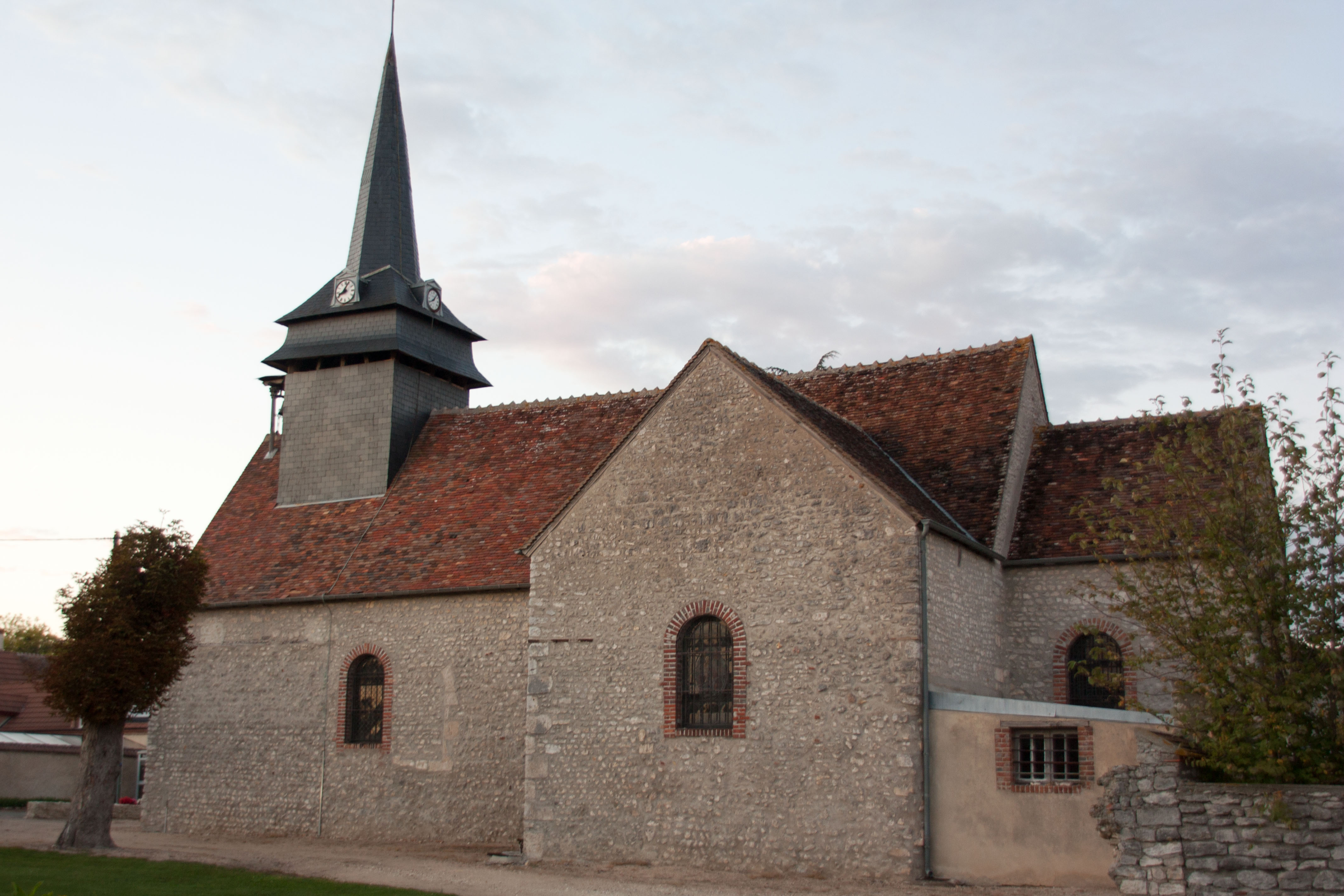 Eglise de Pressigny-les-Pins, Pressigny-les-Pins, Loiret, France